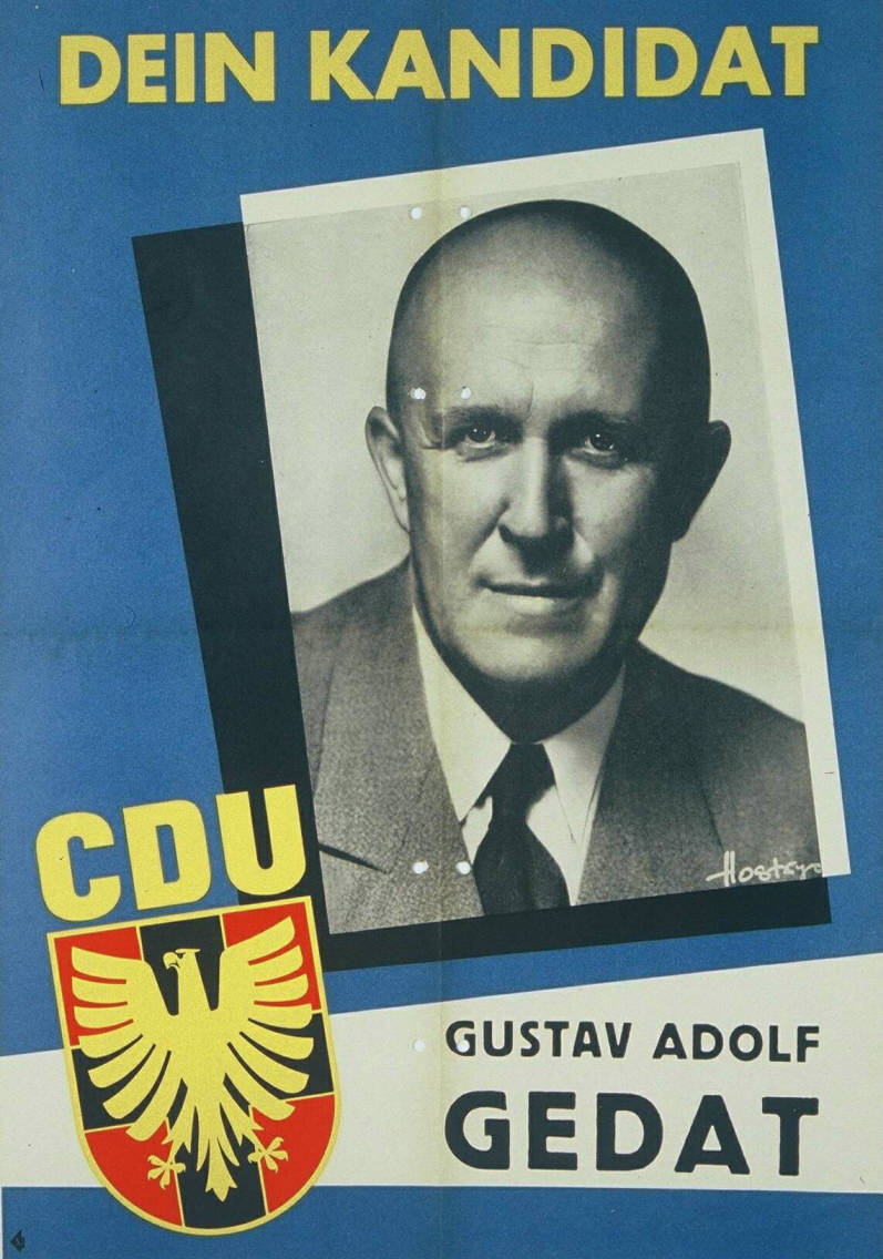 Dein Kandidat Abbildung: Porträtfoto Plakatart: Kandidaten-/Personenplakat mit Porträt Objekt-Signatur: 10-001: 494 Bestand: Plakate zu Bundestagswahlen (10-001) GliederungBestand10-18: Plakate zu Bundestagswahlen (10-001) » Die 2. Bundestagswahl am 6. September 1953 » CDU » Mit Porträtfoto Lizenz: KAS/ACDP 10-001: 494 CC-BY-SA 3.0 DE